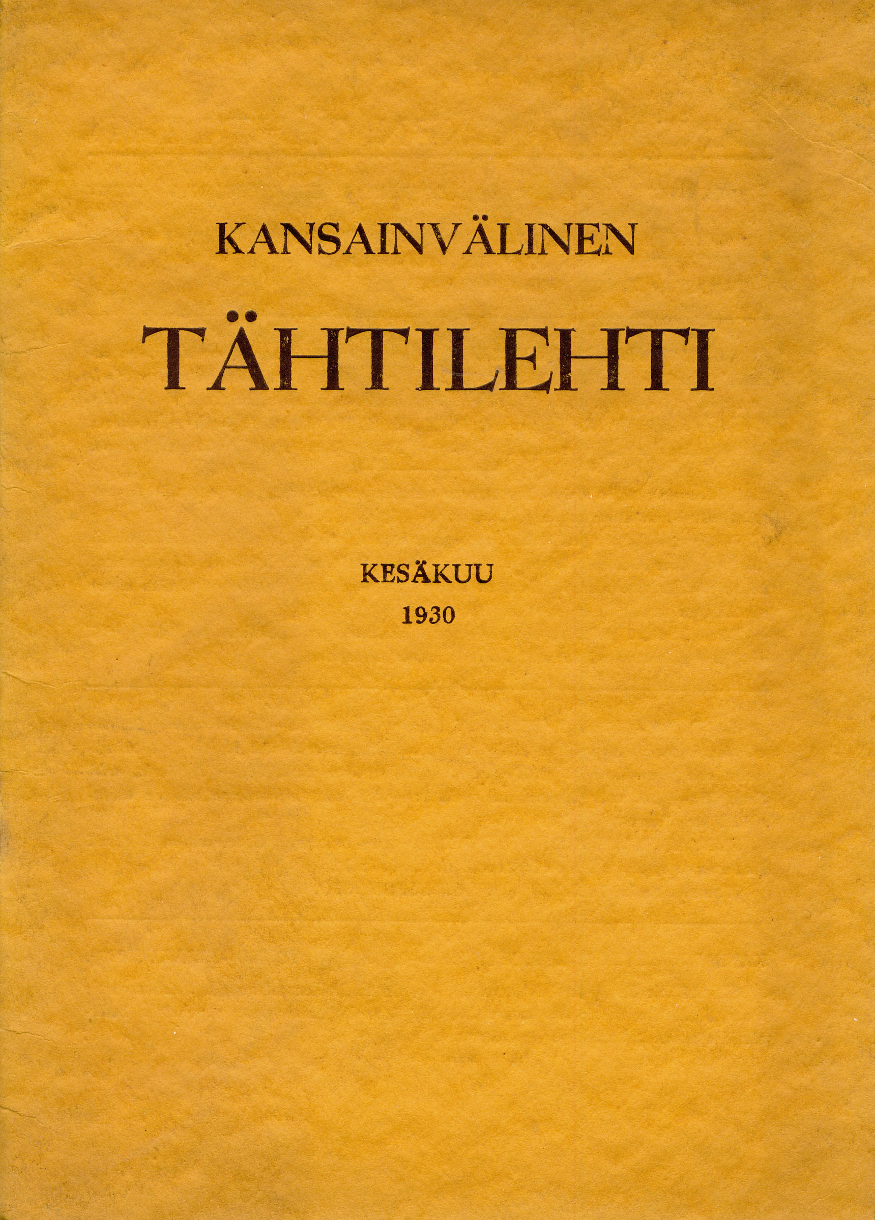 Cover of Kansainvälinen Tähtilehti -magazine